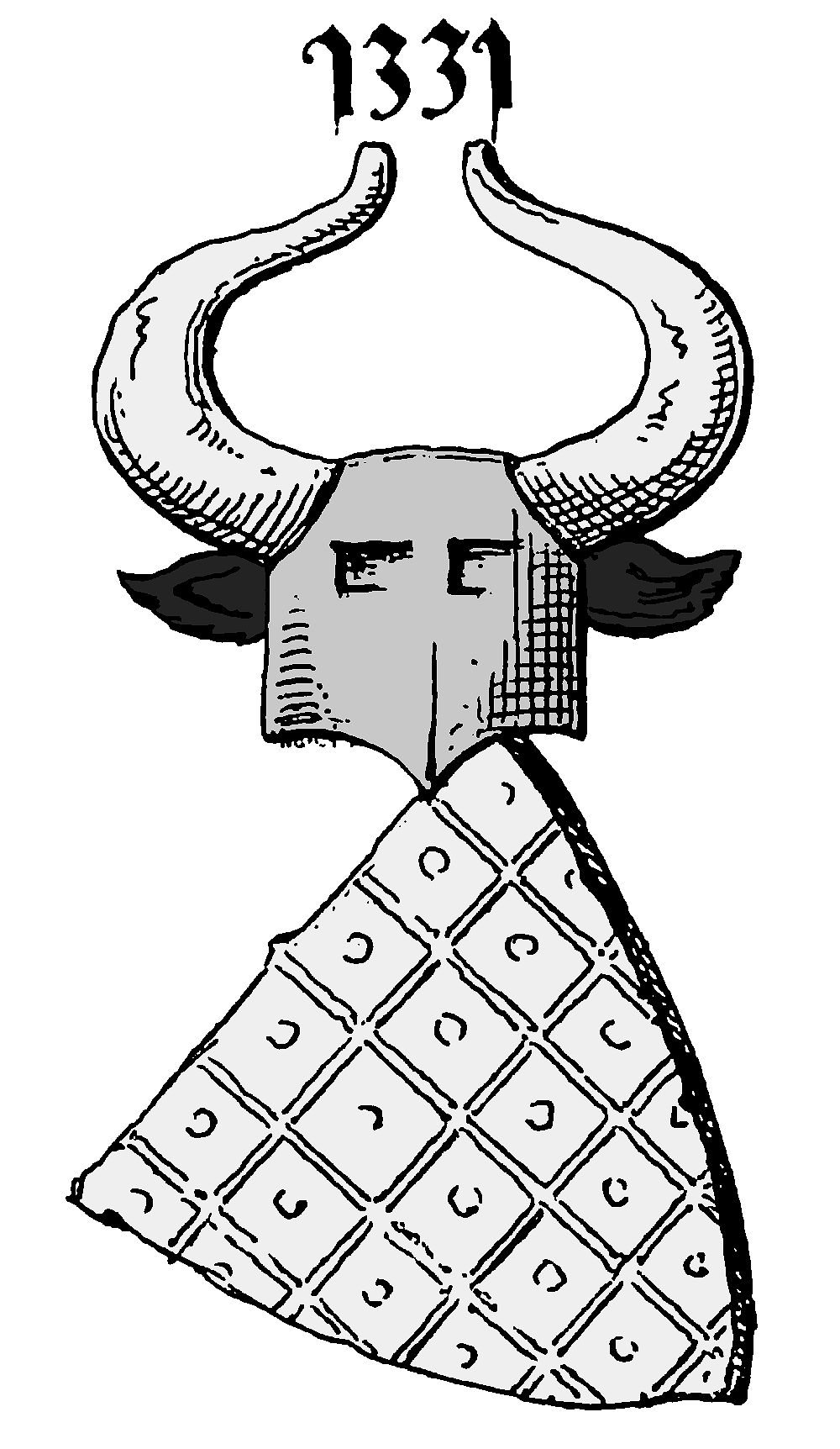 Wappen der von Volkenstorf